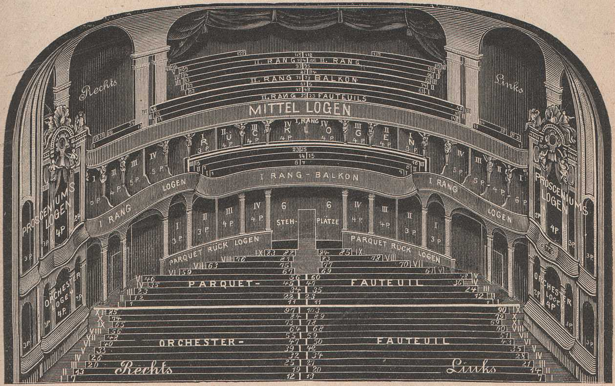 Rudolph Hertzog, Agenda 1912. Jahreskalender des Berliner Kaufhauses. Seite 101. Neues Theater in Berlin NW, Schiffbauerdamm 5. Leinen, 224 Seiten, 19,5 x 28,5 cm